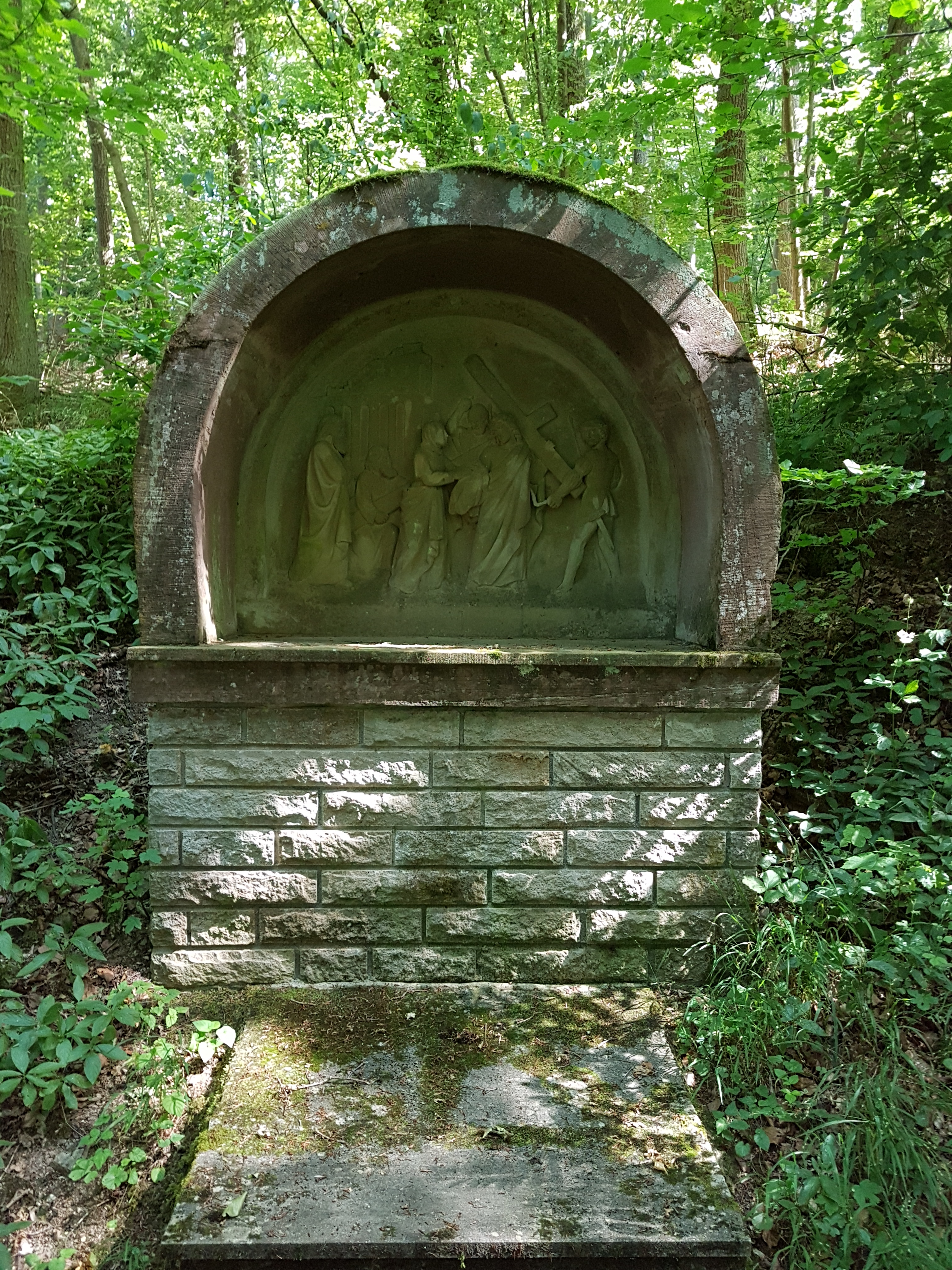 Kreuzweg zur Dittwarer Kreuzkapelle am Kreuzhölzle Bilder hochkant